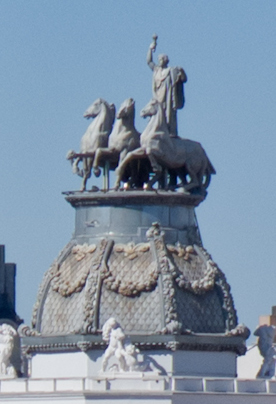 Cuadriga del edificio de Seguros La Aurora de Madrid. Obra de Juan Adsuara